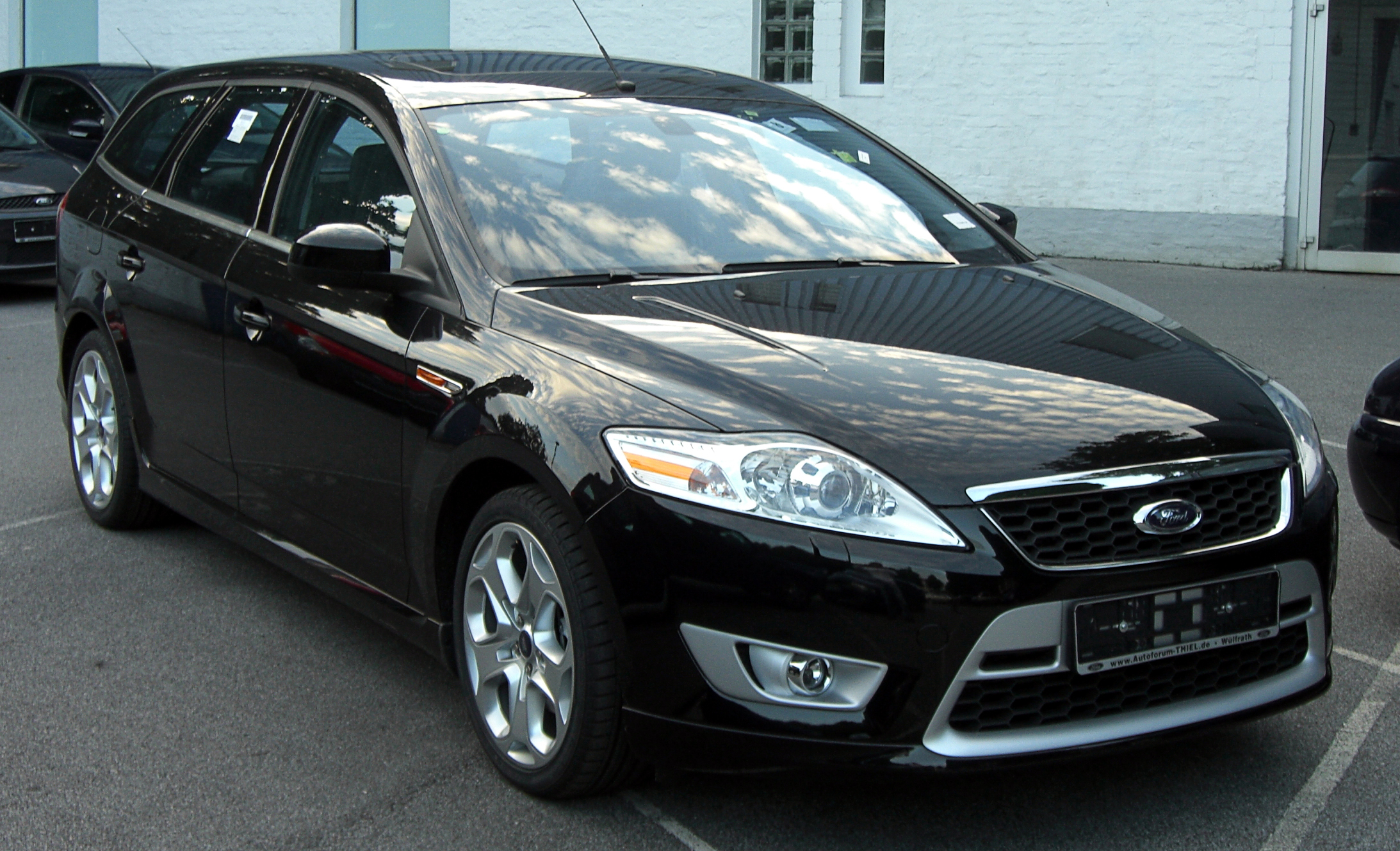 Ford Mondeo Turnier 2.5T